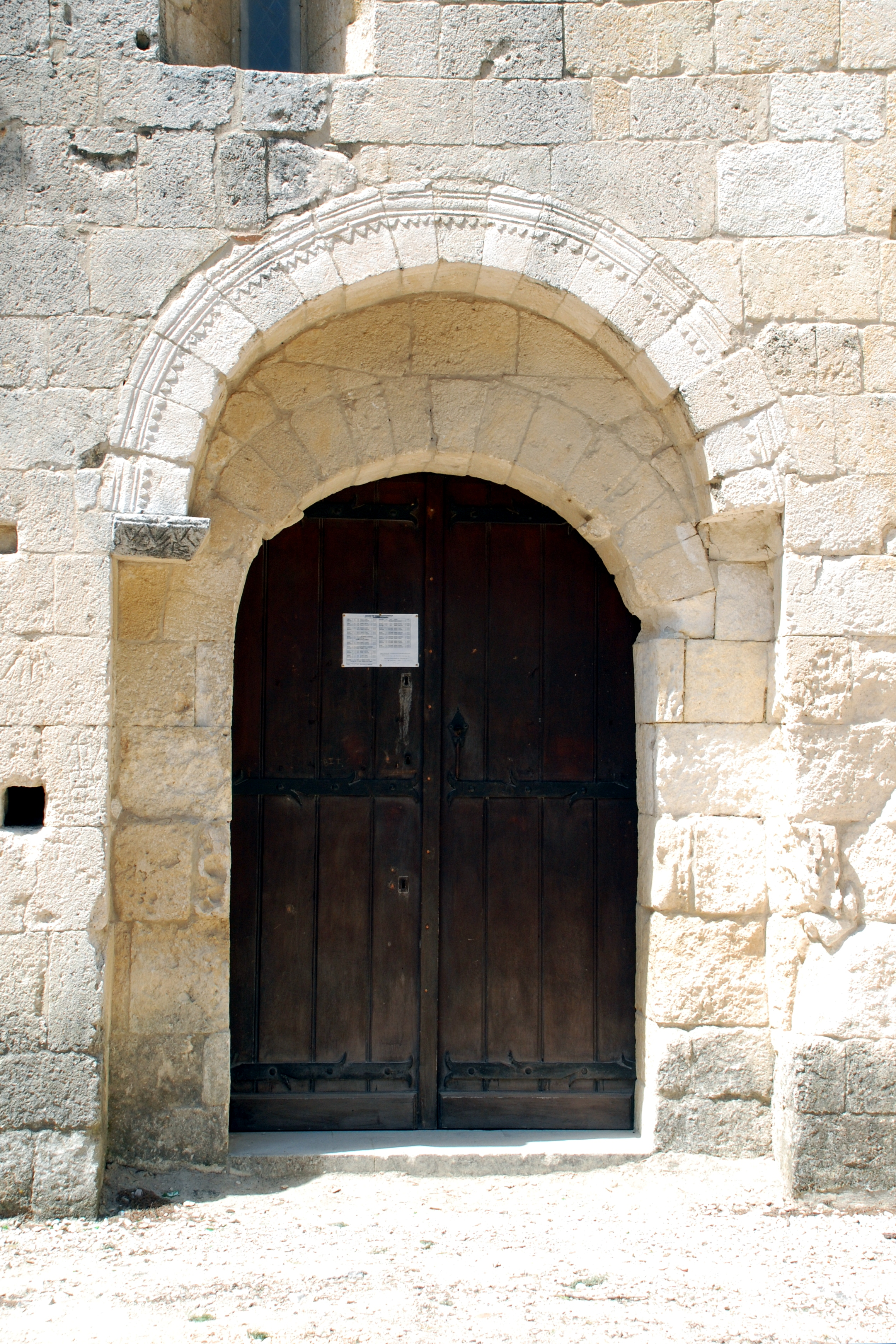 France - Provence - Chapelle Saint-Amand de Théziers